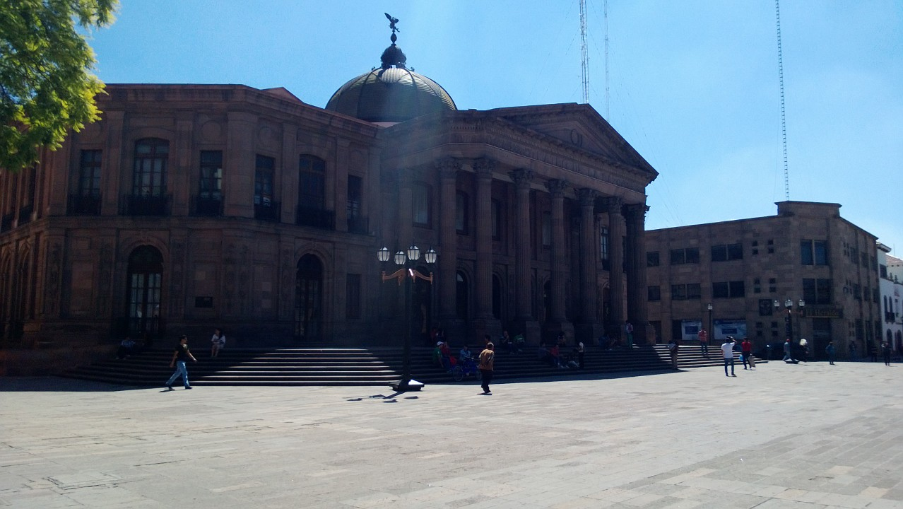 El teatro de la Paz, en la Plaza del Carmen, San Luis Potosí, San Luis Potosí, México